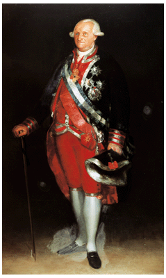 Carlos IV con uniforme de coronel de los Guardias de Corps